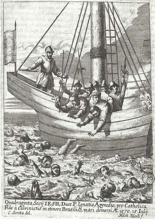 Martírio de Inácio de Azevedo e 39 companheiros - Gravura de Melchior Kuhsel, Martirologo de Mathias Tanner - Biblioteca Nacional de Portugal